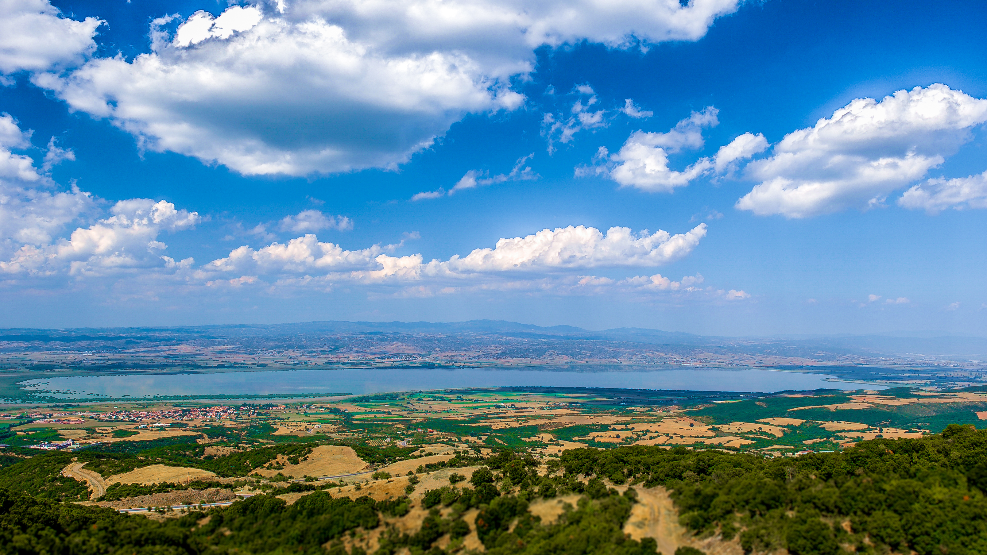 Η λίμνη Κορώνεια ή λίμνη Αγίου Βασιλείου φωτογραφημένη από το βουνό. This is a photography of Natura 2000 protected area with ID GR1220001